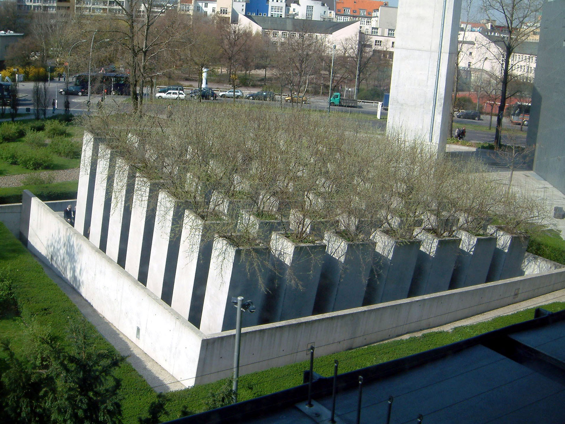 Jüdisches Museum Berlin, Garten des Exils